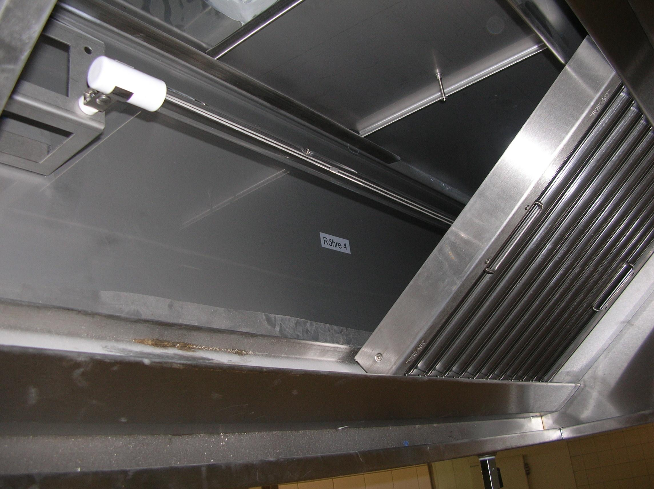 Reven UVC-C Lampe im ausgeschaltetem Zustand.